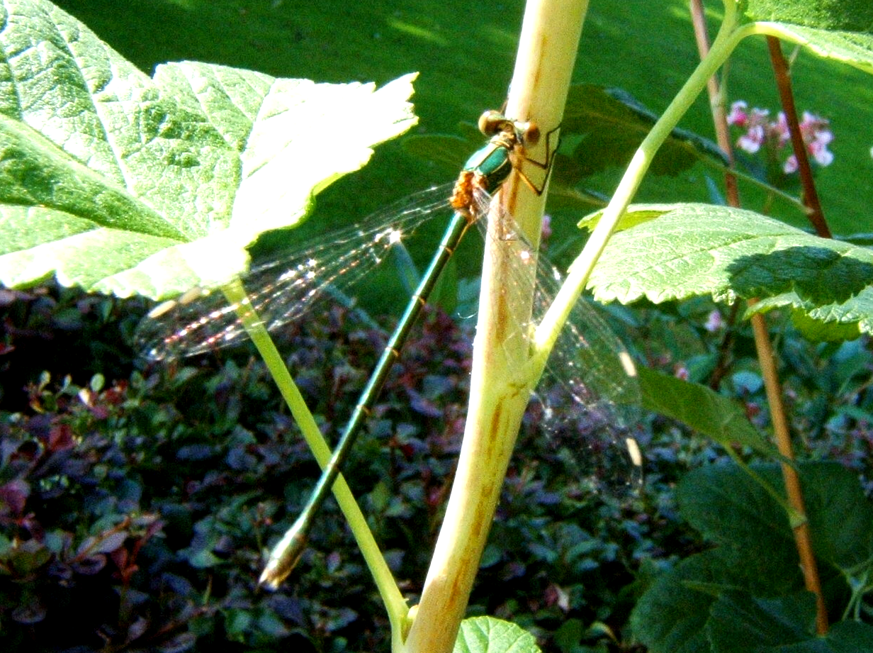 Houtpantserjuffer (Chalcolestes viridis).